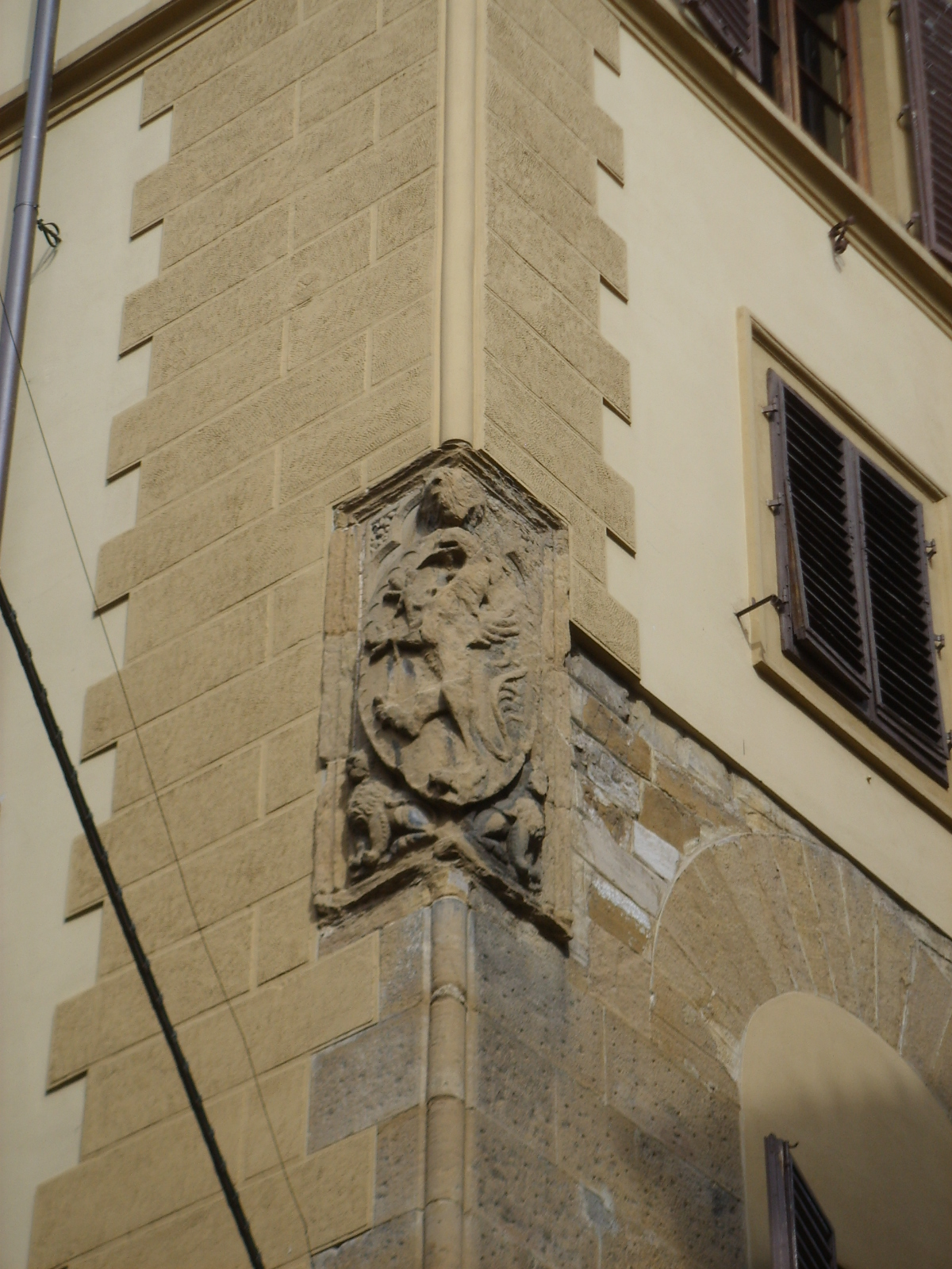 Palazzo di Alberto di Zanobi 04 stemma